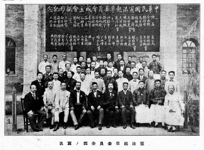 中華民國憲法起草委員會成立會攝影紀念。一：陳善、金鼎勳、張耀曾、高家驥、褚輔成、湯漪（委員長）、王家襄（理事）、陳銘鑑、史澤咸、夏同和（理事）。十一：汪彭年、孫潤宇、金兆棪、石德純、宋淵源、朱兆莘、孟森、谷鍾秀、何雯、劉恩格。二十一：王紹鏊、向乃祺、蔣曾燠、趙世鈺、王敬芳、藍公武、解樹強、黃雲鵬（理事）、李慶芳。三十：楊銘源（理事）、易宗夔、王賡、陸宗輿、李國珍、黃璋、劉崇佑、李芳、丁世嶧、楊永泰（理事）。四十：孫鐘、王鑫潤、王用賓、王印川、饒應銘、蔣舉清（理事）、呂志伊、徐秀鈞、陳景南、張我華、吳宗慈。